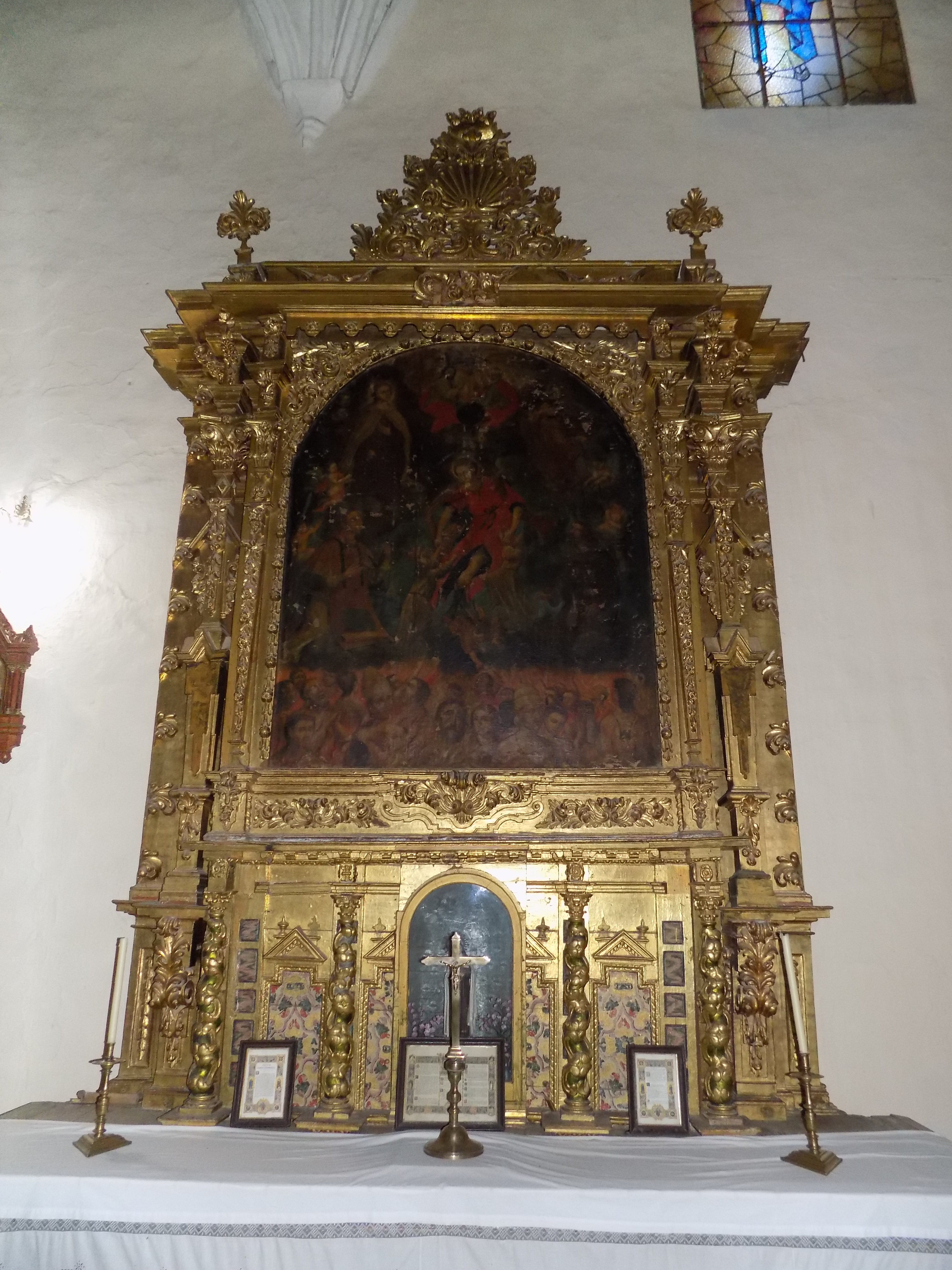 Retablo de las Ánimas del Purgatorio en la iglesia de Nuestra Señora del Castillo de Fuente Obejuna, provincia de Córdoba, (España).